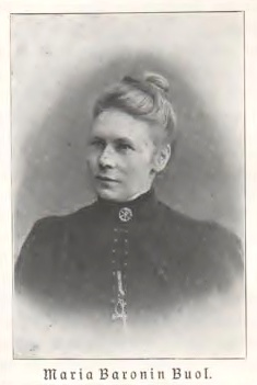 Maria von Bouol (1861-1943), Tiroler Adelige und Buchautorin